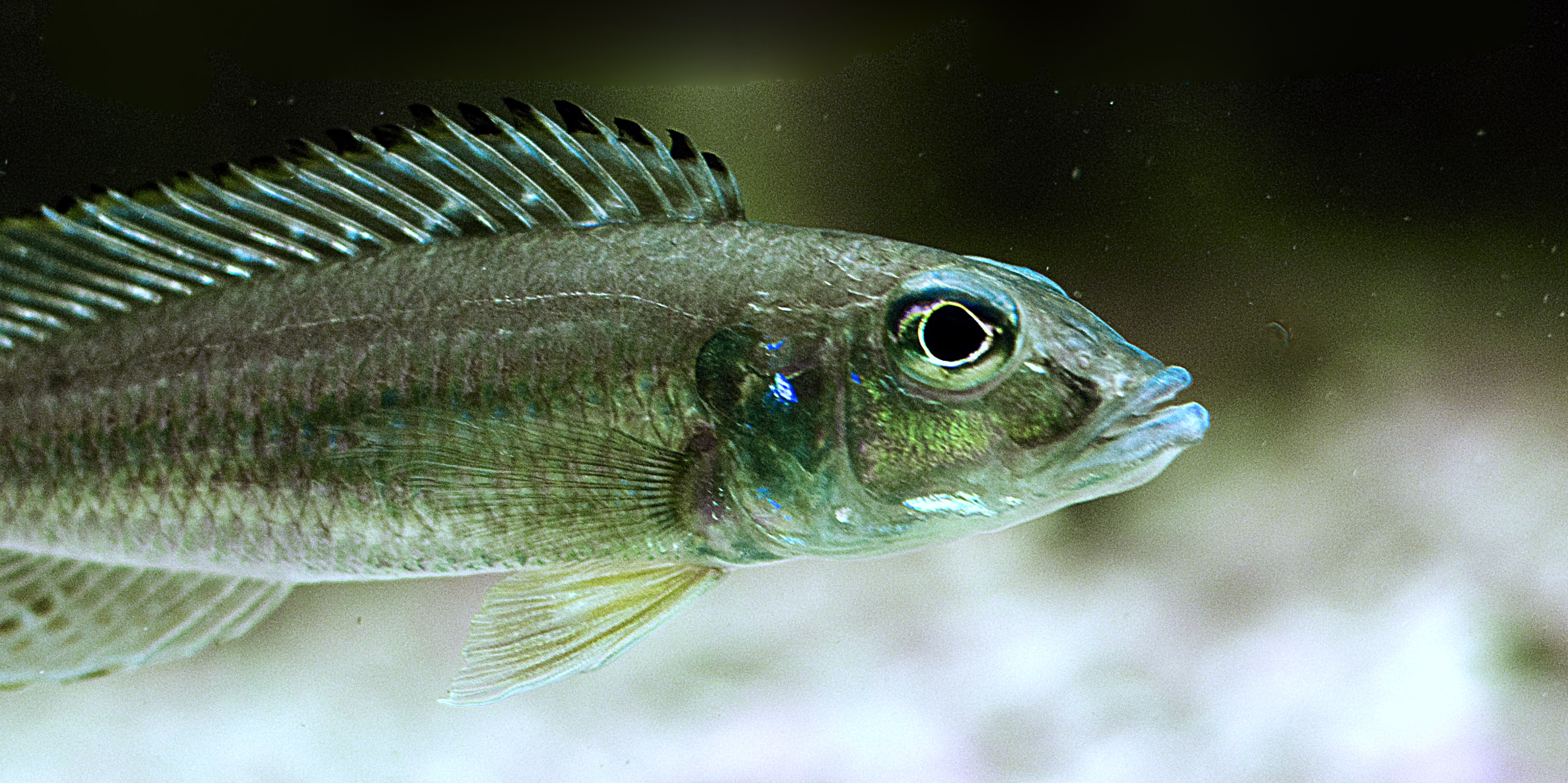 Reganochromis calliorus